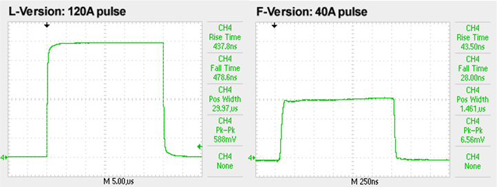 Strompuls eines LIV100-L120